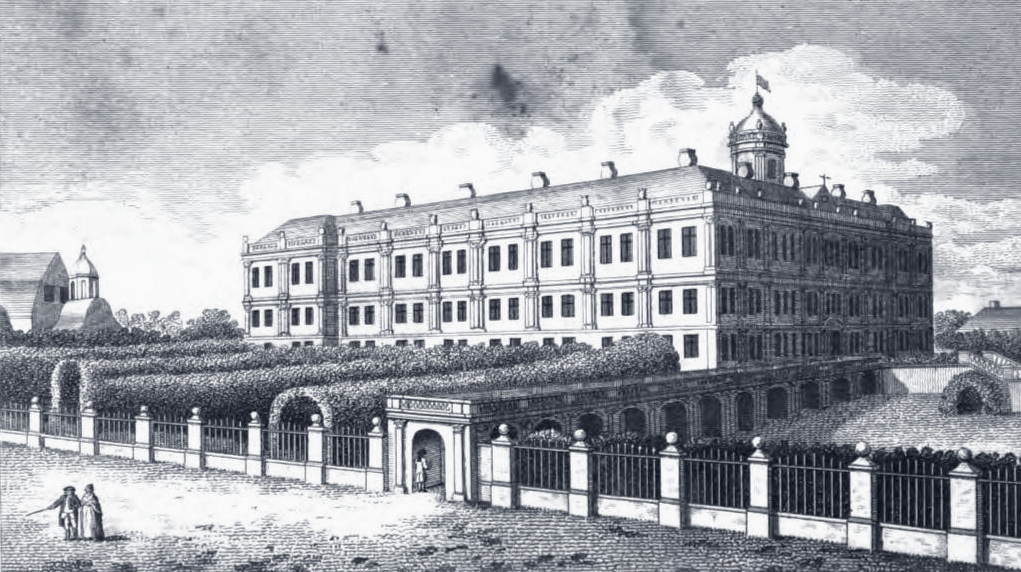 Ansicht des Neustrelitzer Residenzschlosses in seinem ursprünglichen Bauzustand im 18. Jahrhundert